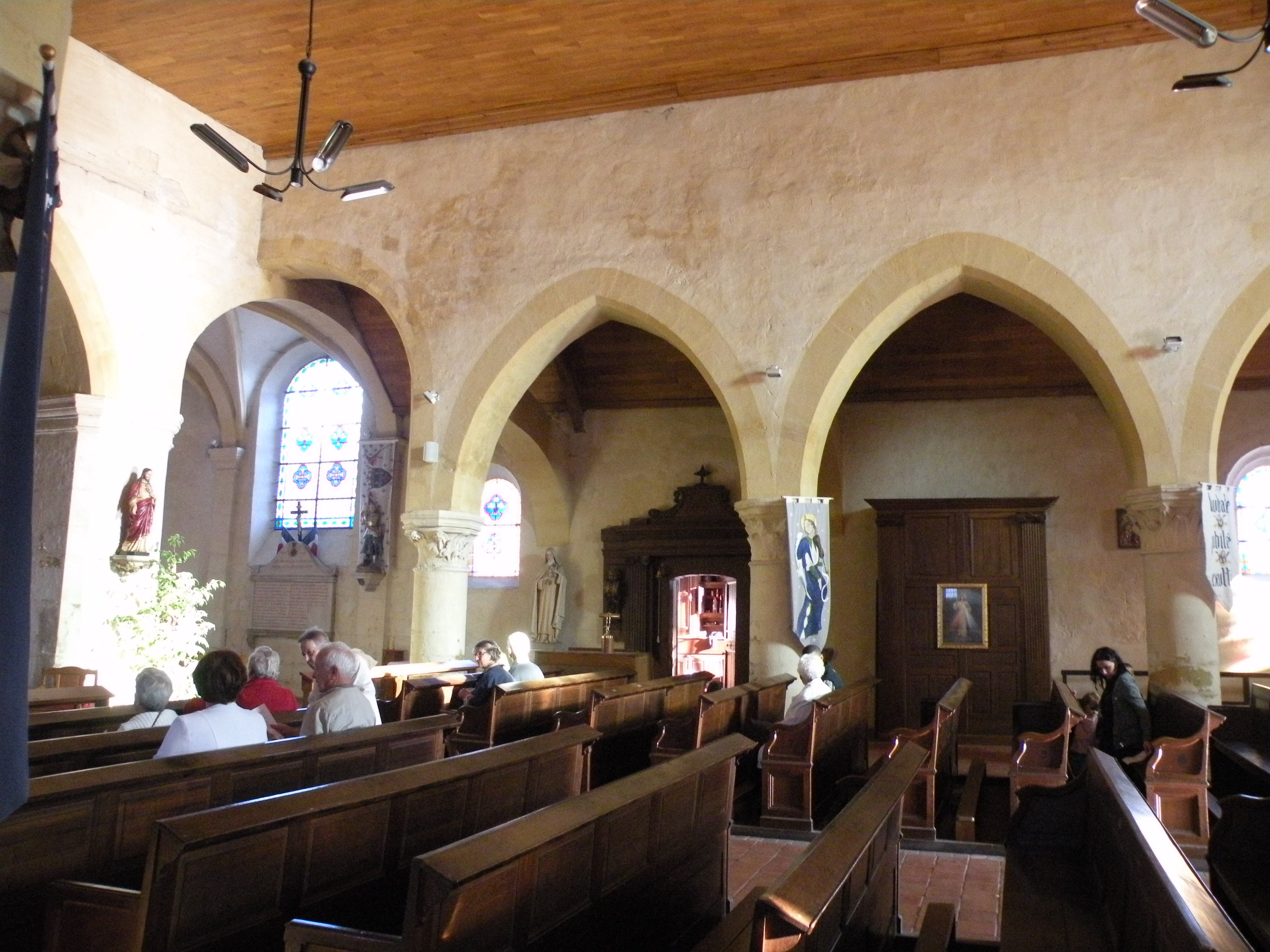 Intérieur de l'église Saint-Denis de Bornel